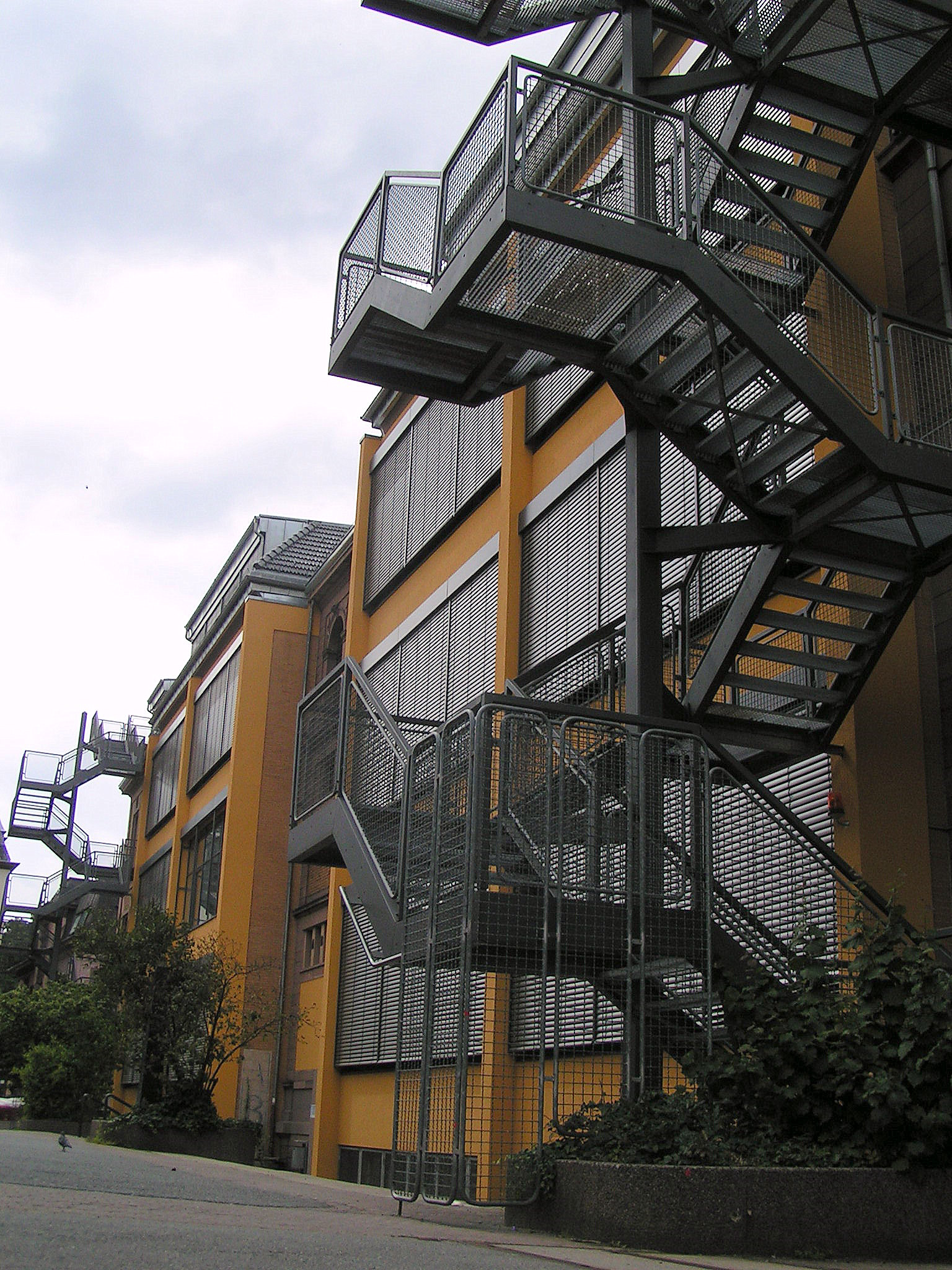 Rückseite